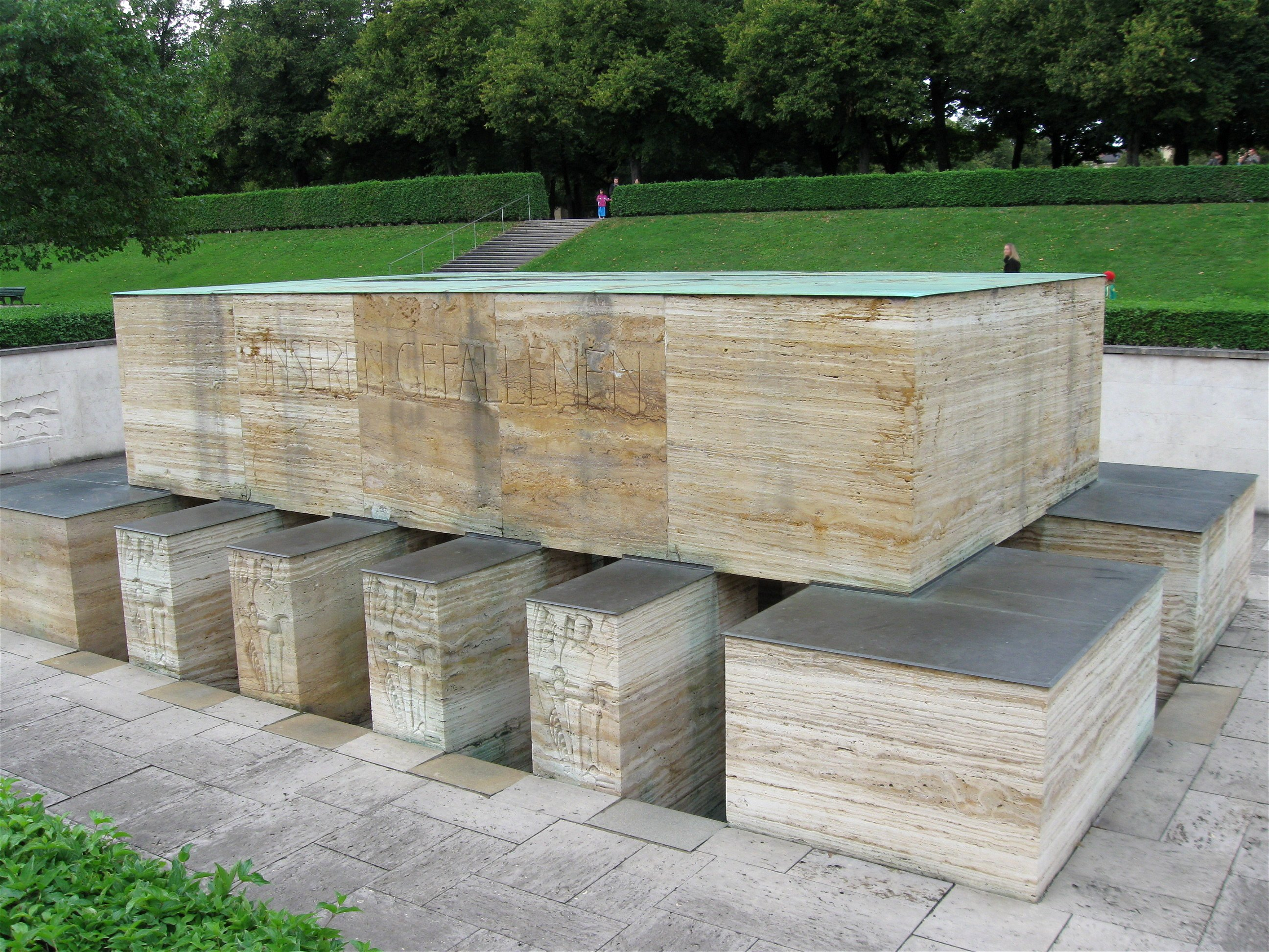 Hofgarten; Kriegerdenkmal, 1924–26 von Karl Knappe, Thomas Wechs und Eberhard Finsterwalder; vor dem Armeemuseum. Die Rotmarmor-Liegefigur eines Kriegers von Bernhard Bleeker 1972 durch Bronzekopie ersetzt.